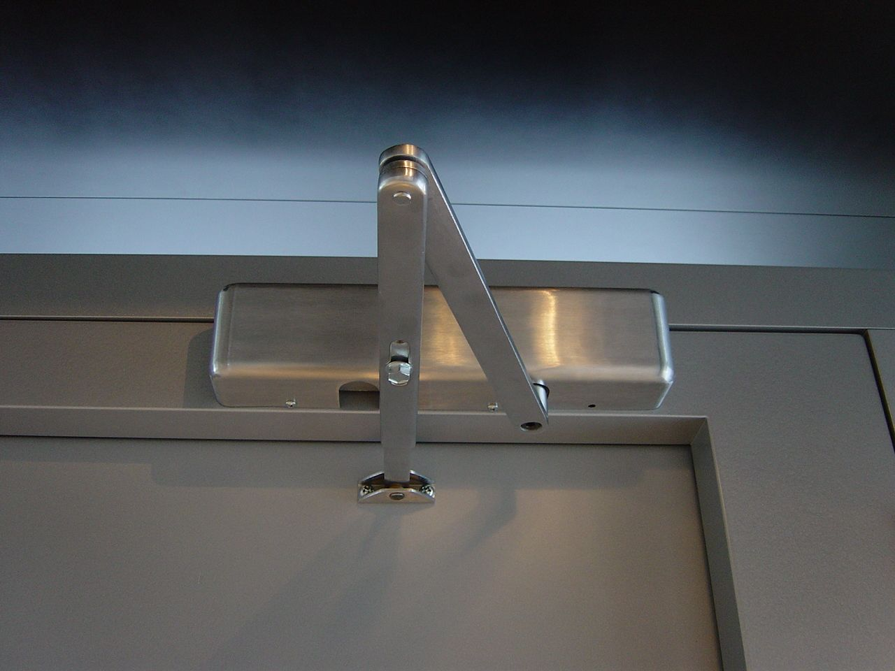 Obentürschließer mit Scherengestänge der Firma Dorma